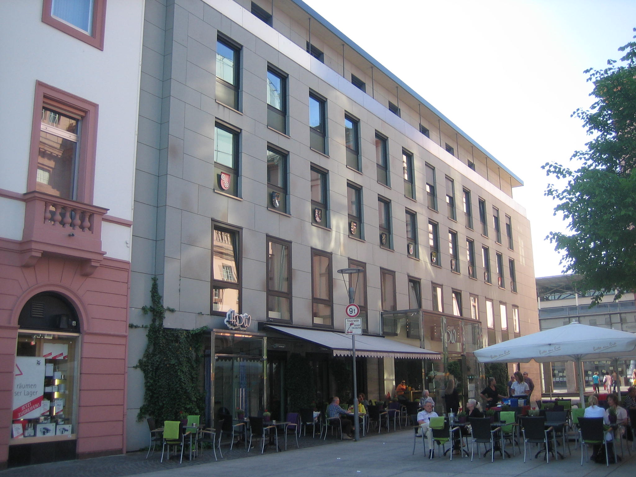 Das Haus des Deutschen Weines beherbergte bis April 2016 den Deutschen Weinfonds (DWF) das Deutsche Weininstitut (DWI) und ein Weinrestaurant. Beides sind Interessenvertretungen der deutschen Weinwirtschaft. Eine Galerie von Wappenschilden steht für die deutschen Weinbaugebiete.